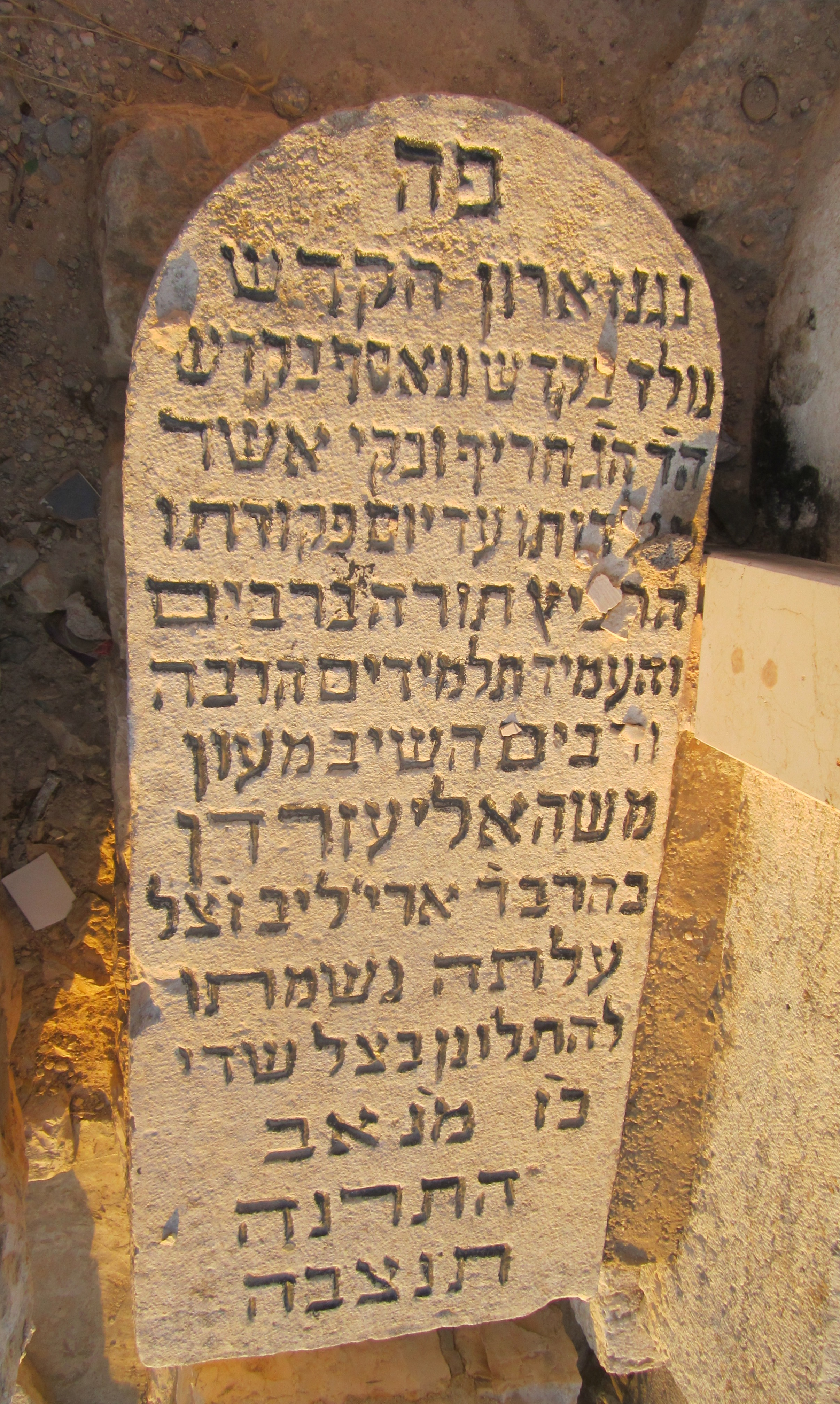 קבר הרב משה אליעזר דן רלב"ג בהר הזיתים